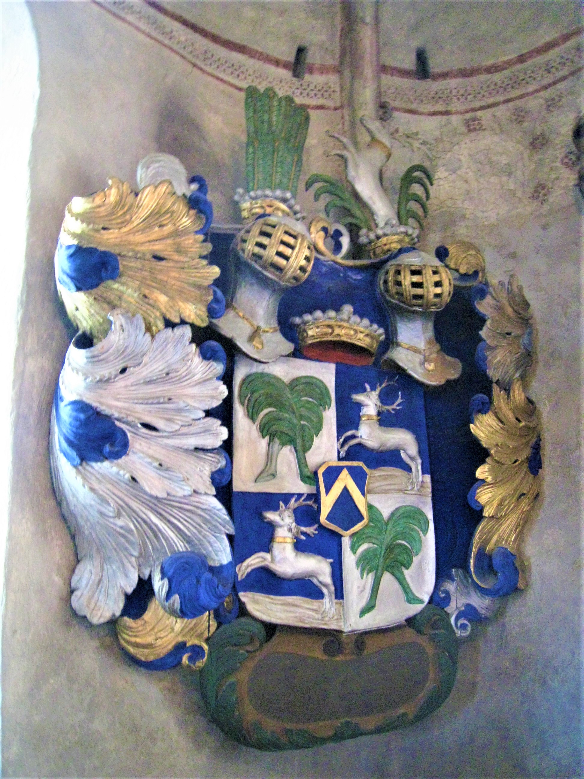 Ytterjärna kyrka, Södermanland, vapen, huvudbaner för Lars Eriksson Sparre (1590-1644).